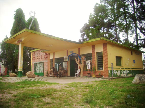 Exterior del museo.